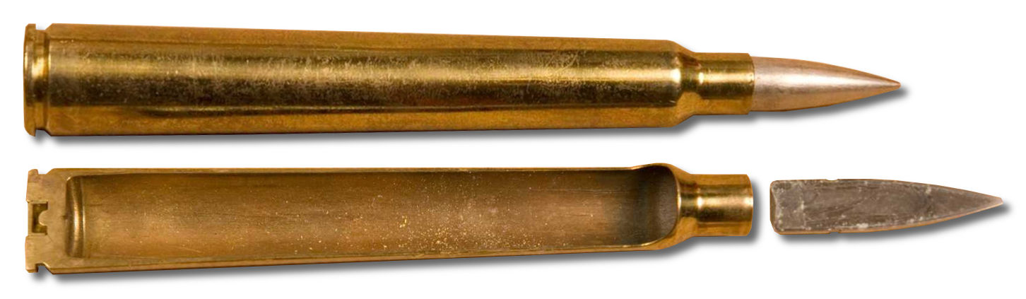 Poljski protitankovski naboj 7,92x107 DS.